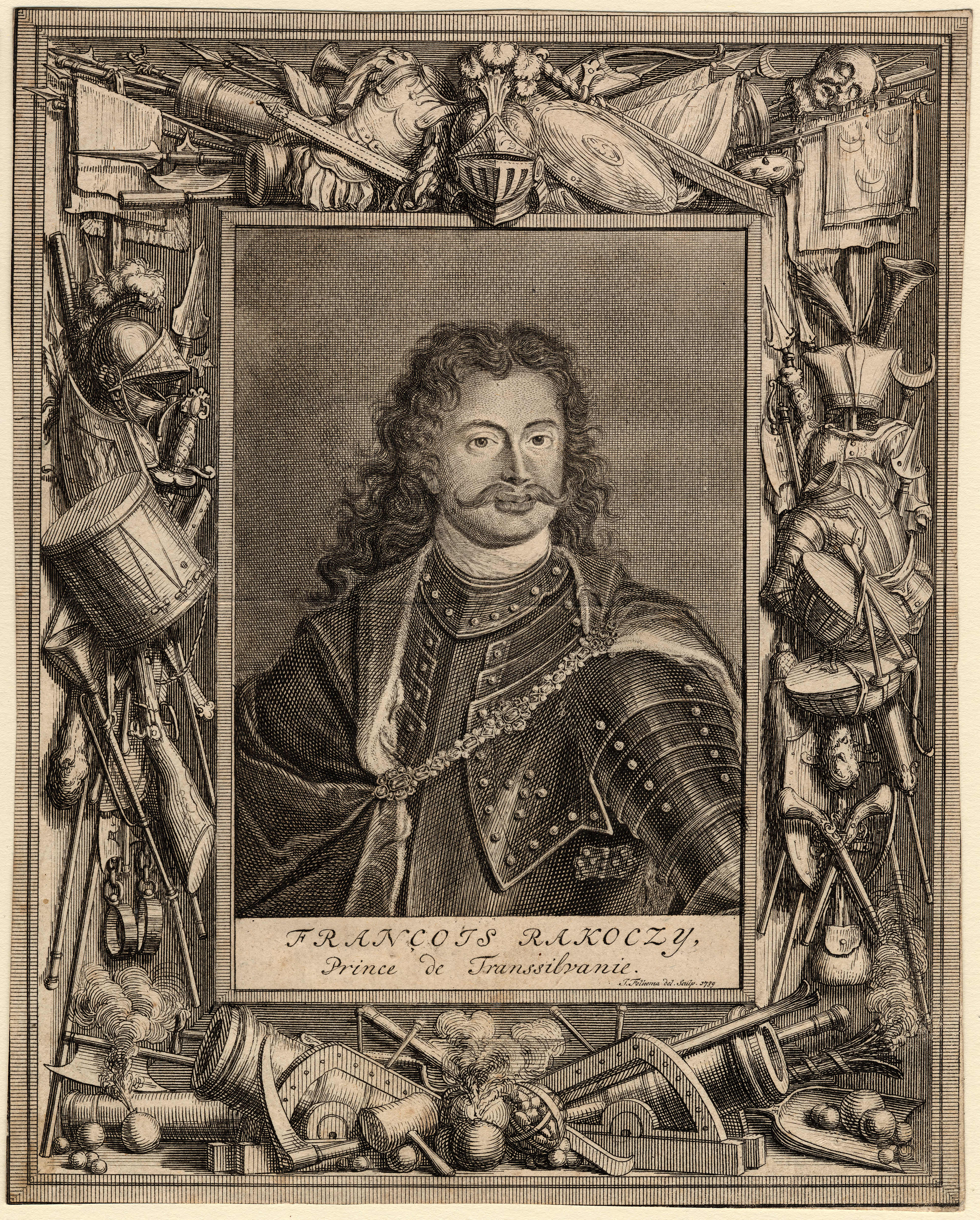 Vasárnapi Ujság 50. évf. 19. sz. (1903. május 10.), illusztráció II. Rákóczi Ferenc arcképe